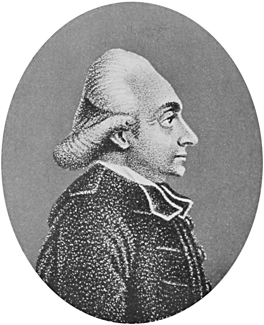 Joseph Hilarius Eckhel (1737–1798), österreichischer Altphilologe. Anonymer Stich (aus Seidlitz, Allg. histor. Porträtw., F. Bruckmann, München